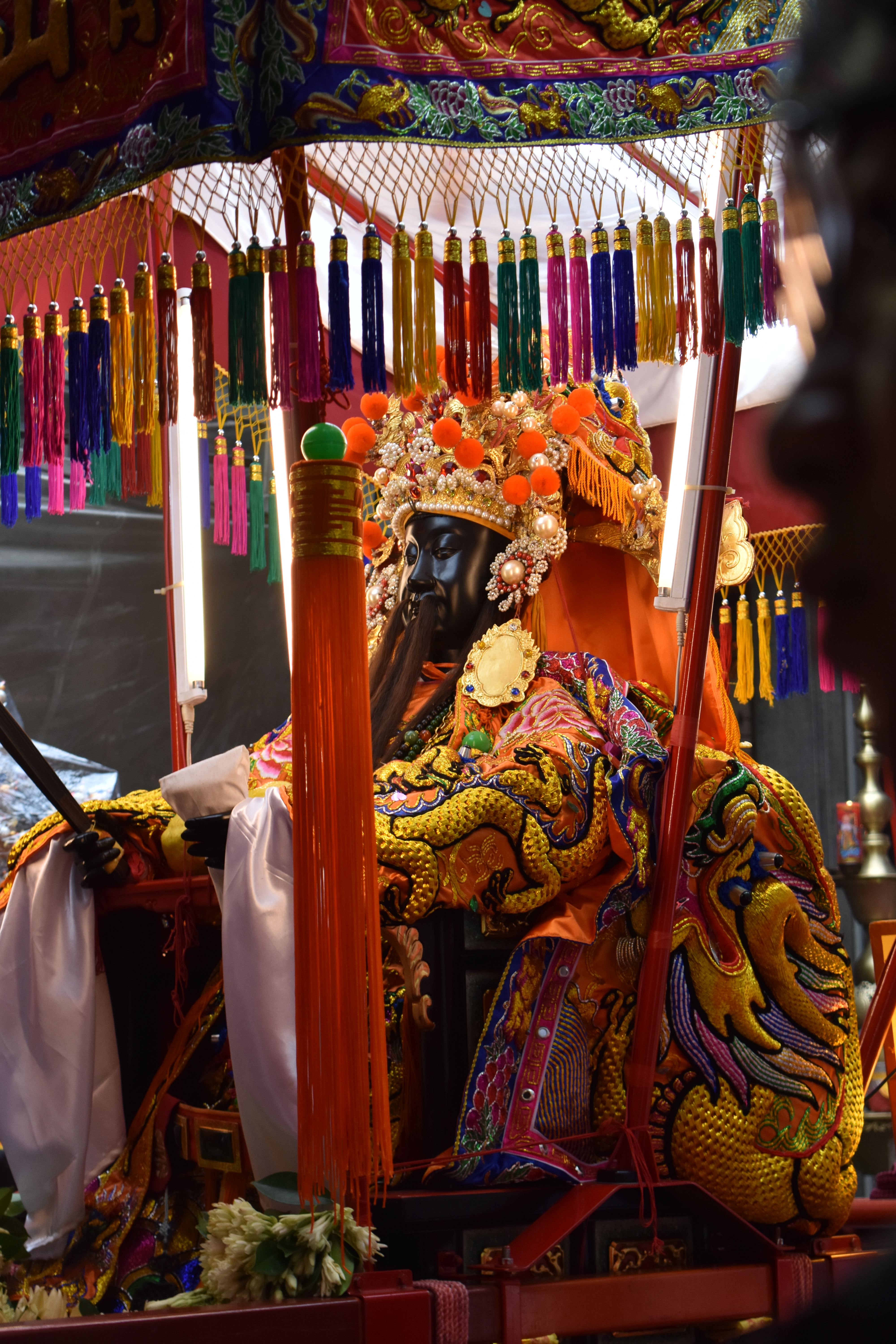 艋舺青山宮暗訪暨遶境